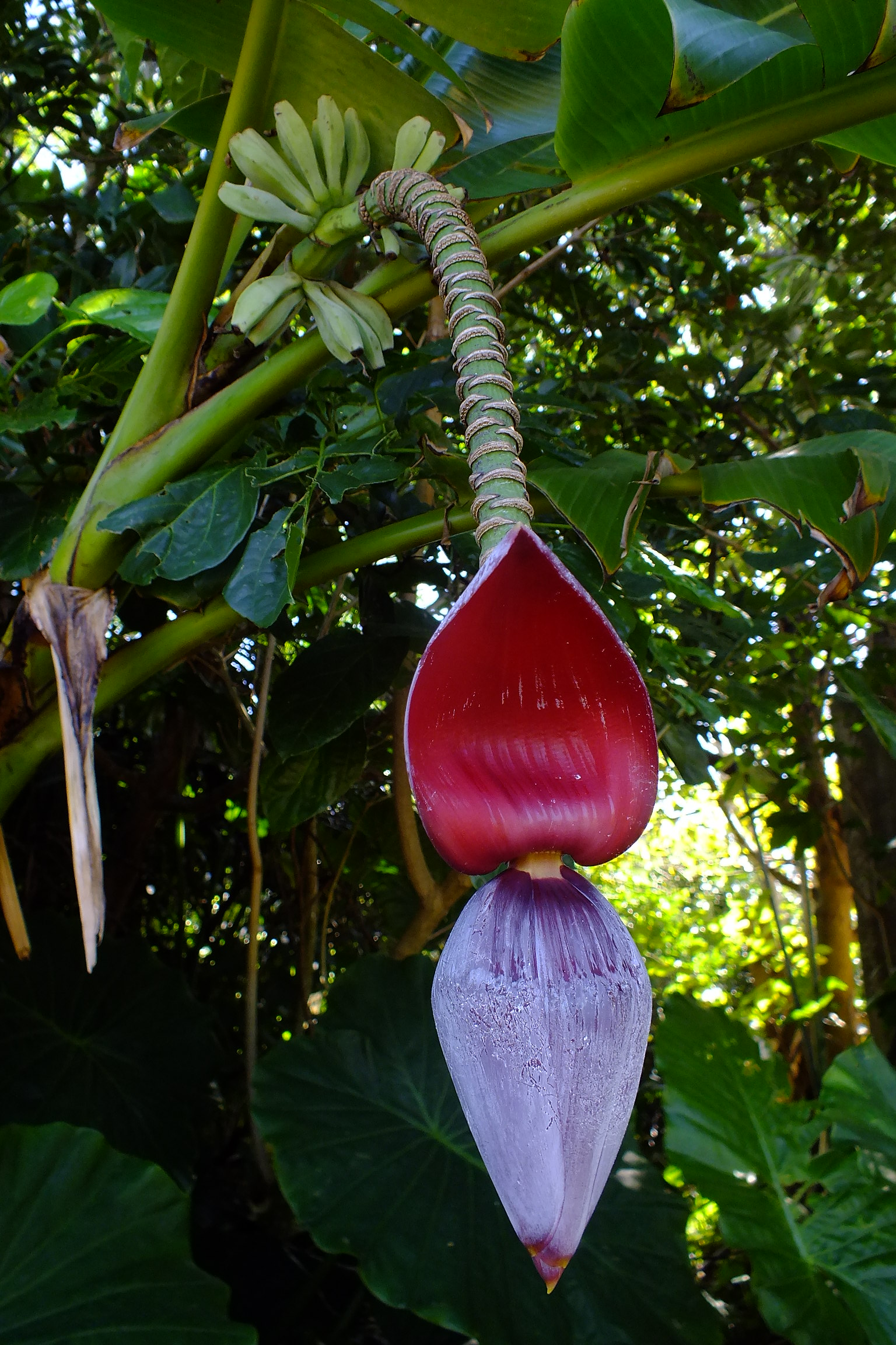 2017-01-29 Banana in Iriomotejima 西表島古見のバナナ